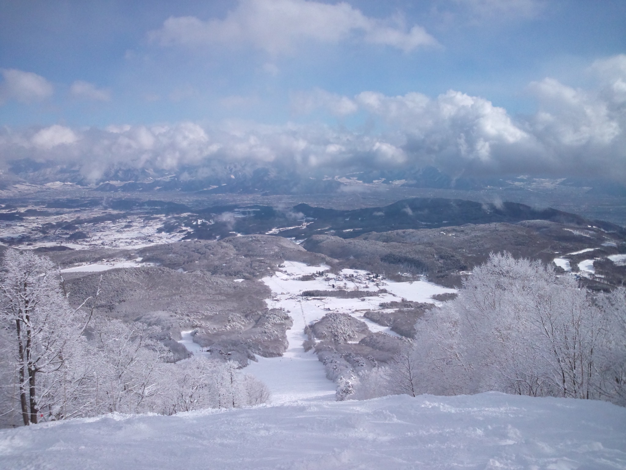 いいづなリゾートスキー場 ドコモスマートフォンF-06Cにて撮影